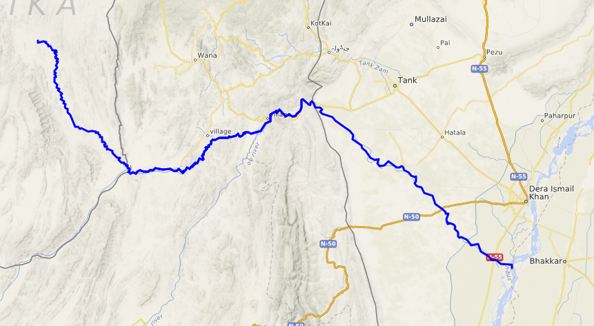 carte réalisée sur umap This map may be incomplete, and may contain errors. Don't rely solely on it for navigation.